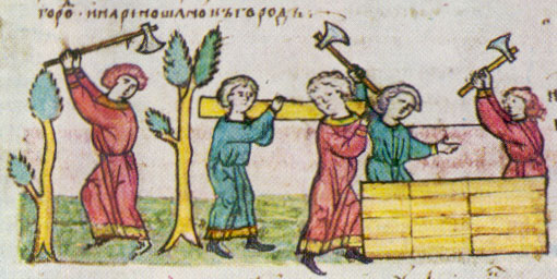 фрагмент Радзивиловской летописи, лист 48об. На миниатюре: Рубка леса, строительство городских ограждений